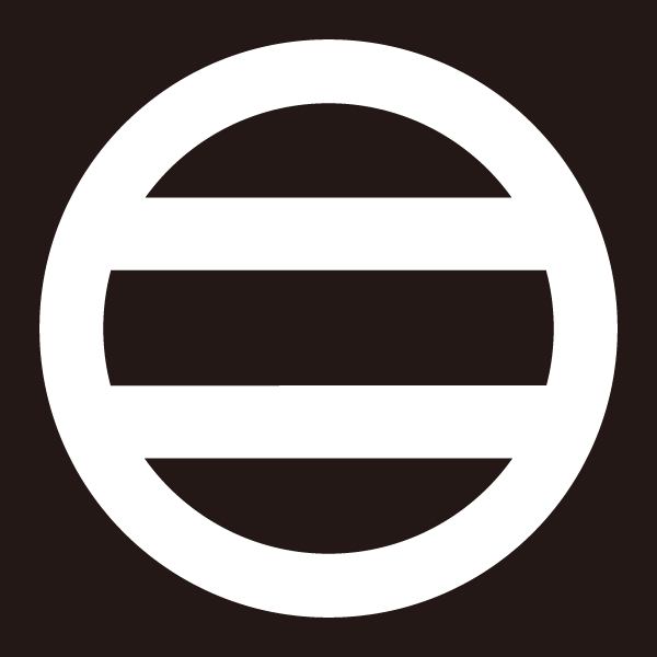 丸に二つ引き